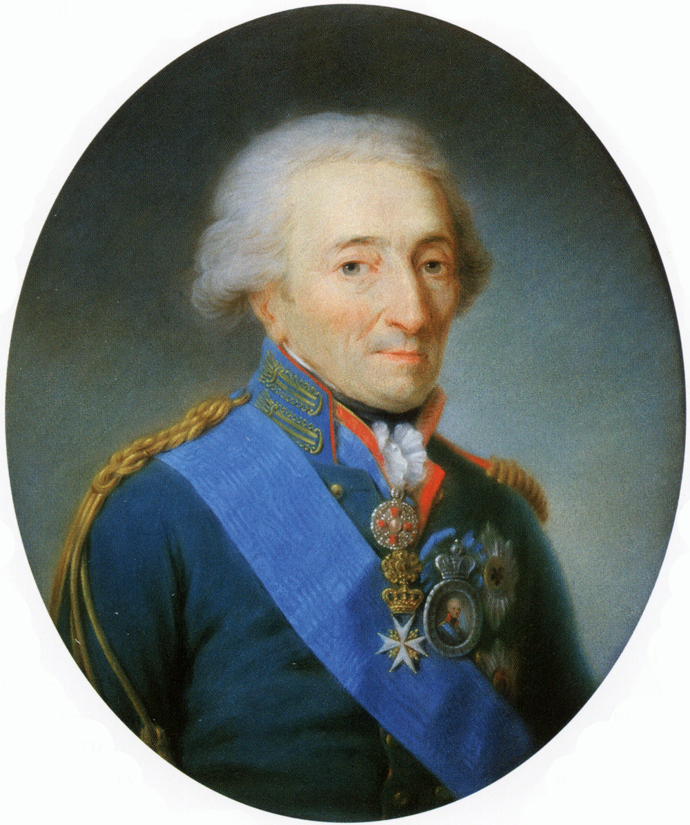 Portrait of Nikolay Ivanovich Saltykov (1736-1816)